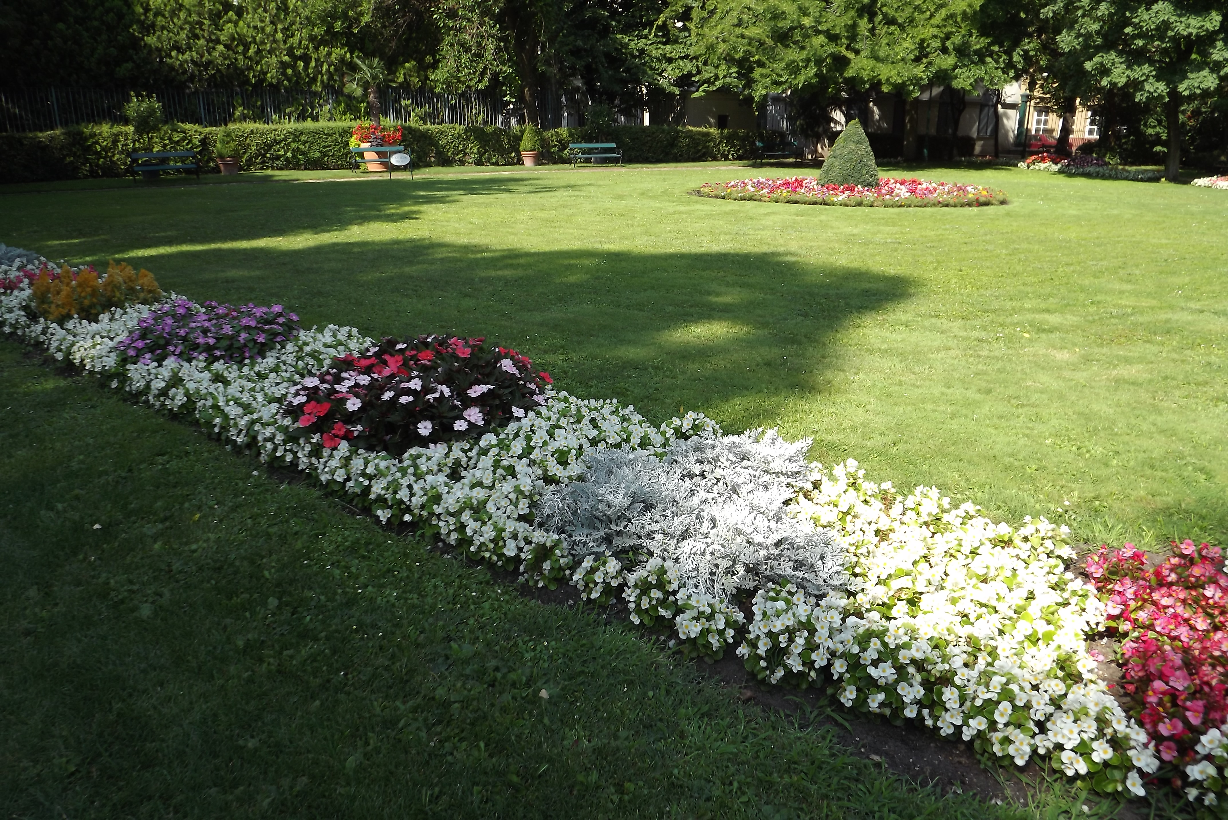 A budapesti Károlyi-kert 2014 augusztusában (Budapest, V. ker.)